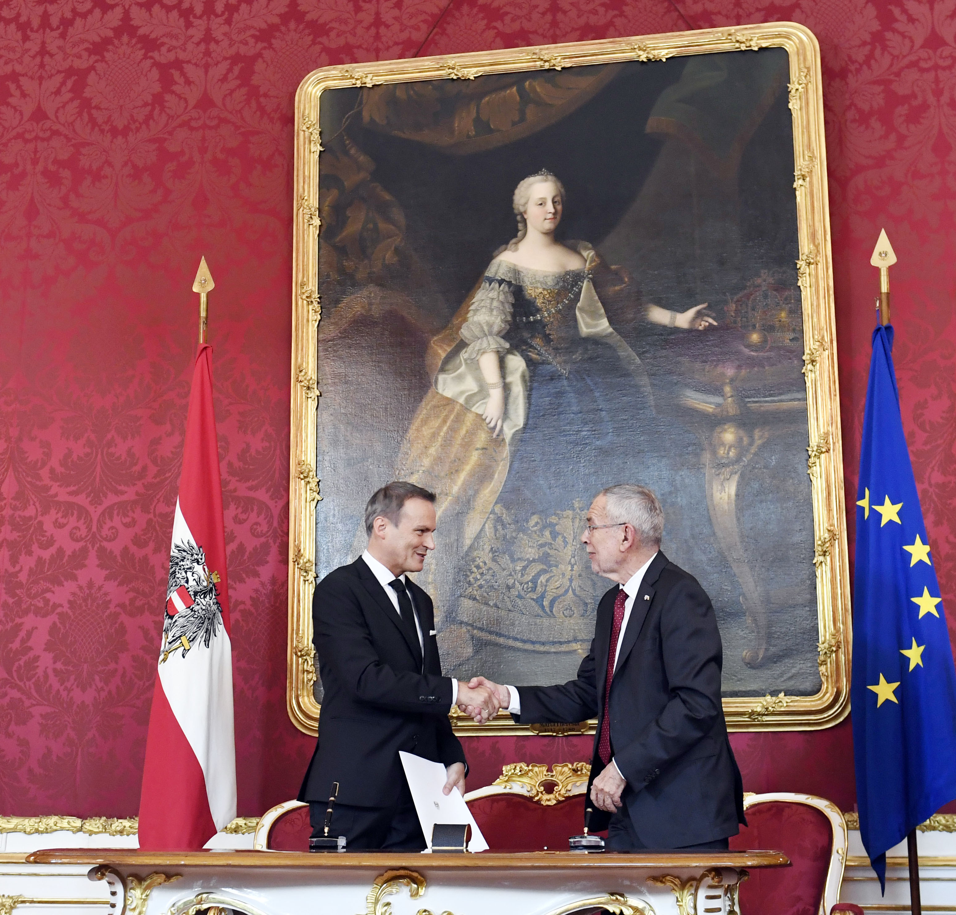 Am 3. Juni 2019 wurde Mag. Alexander Schallenberg als Bundesminister für Europa, Integration und Äußeres angelobt. Foto: Mahmoud